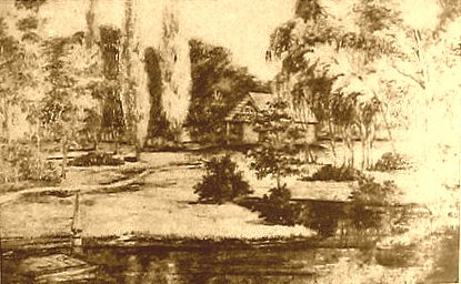 Pieniuha - fragment parku, Napoleon Orda